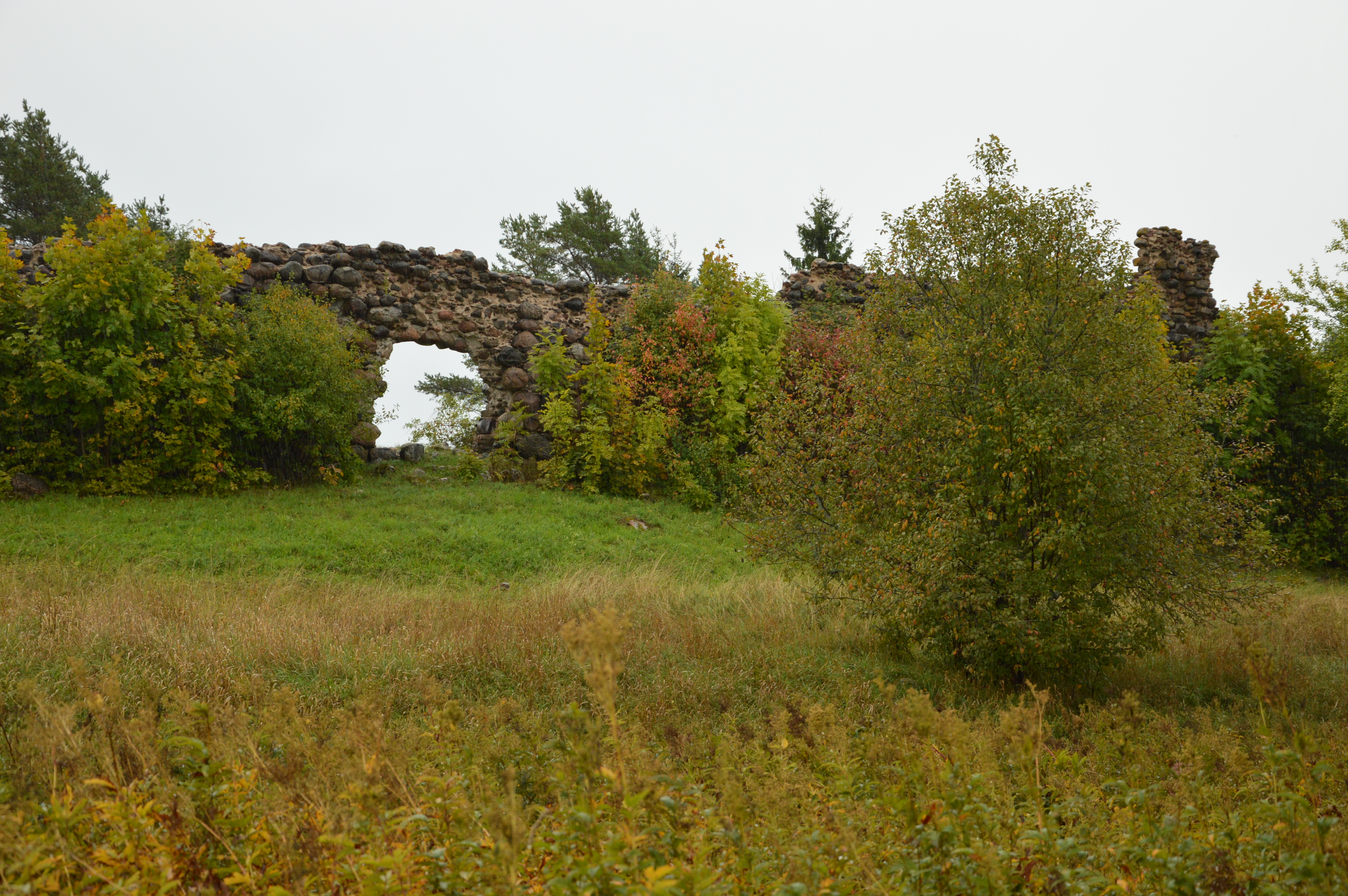 Vana-Pebalgi piiskopilinnus